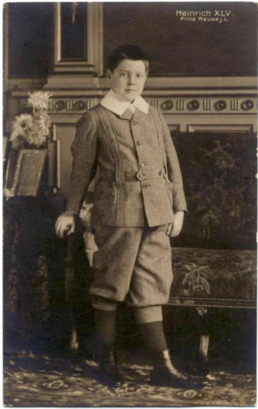 Prinz Heinrich XLV. Reuß jüngere Linie